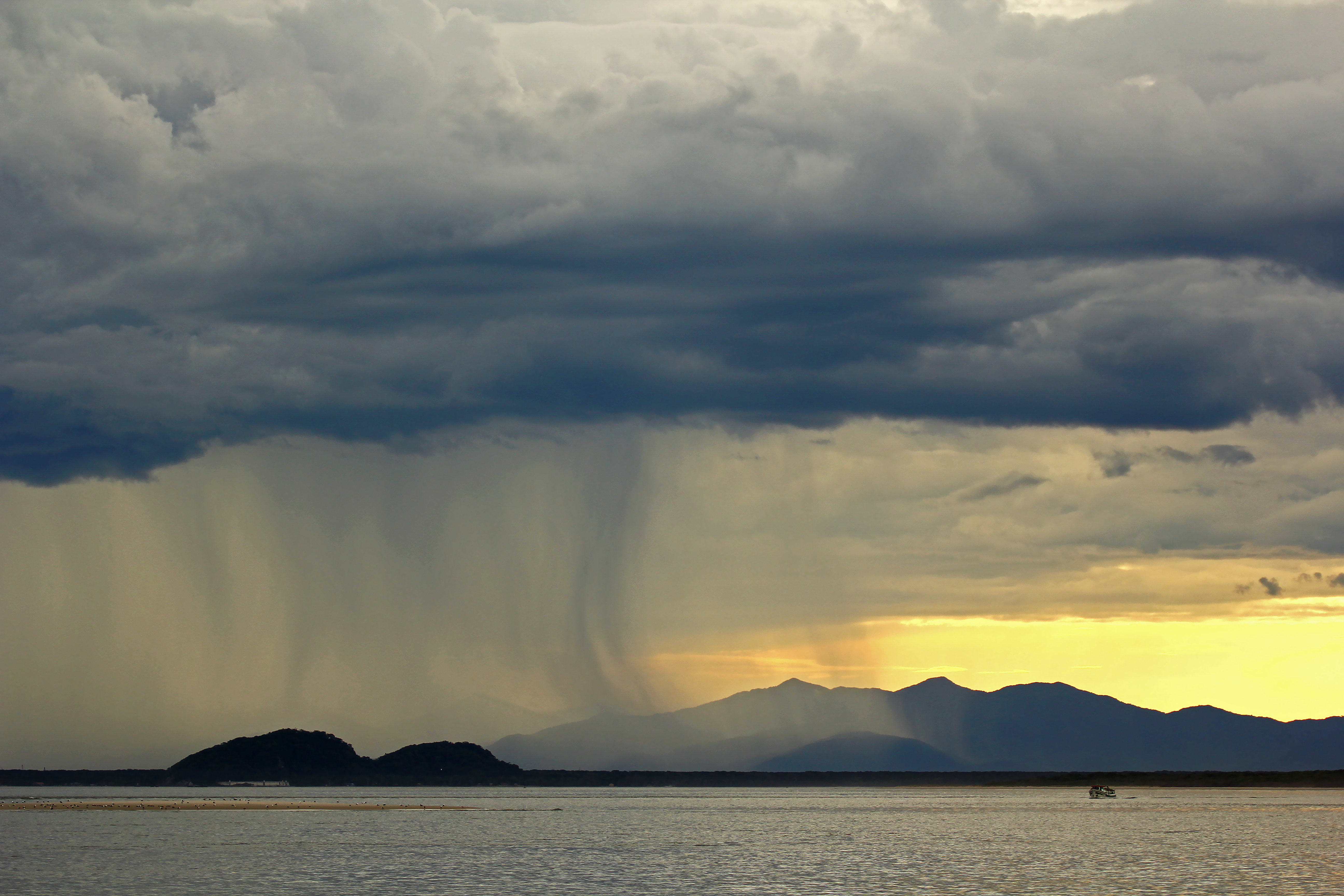 Uma nuvem de chuva irriga parte da Ilha do Mel, Parque Estadual da Ilha do Mel, no Estado do Paraná, Brasil, em foto tirada a partir da Ilha do Superagui.